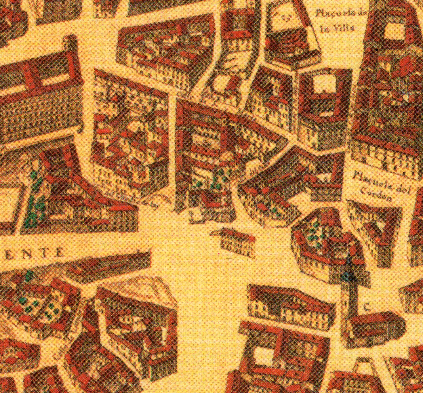 Topografía de la Villa de Madrid descrita por Don Pedro Texeira en 1656, en la cual se demuestran todas las calles al largo y ancho de cada una de ellas, las rinconadas y lo que tuercen las Plazas, fuentes, jardines y huertas con la disposición que tienen las parroquias, Monasterios y Hospitales están señalados sus nombres con letras y números que se hallaran en la tabla y los demás edificios, torres y delanteras de las casas de la parte que mira al Mediodía están sacadas al natural que se podrán tocar las puertas y ventanas de cada una de ellas.